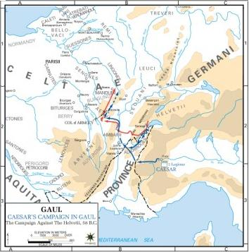 Mapa da invasão da gália